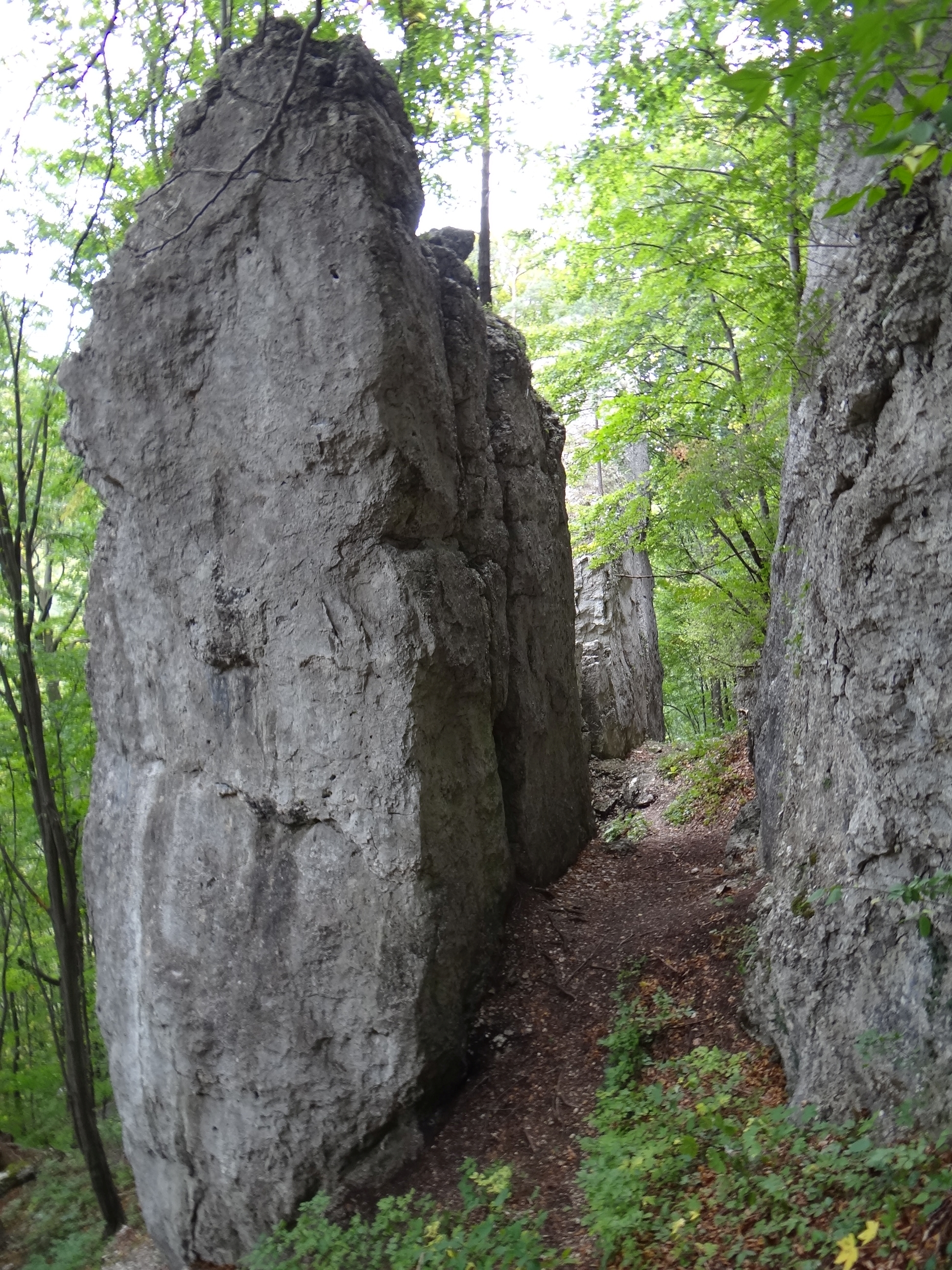 Skała Ząb w Czarcim Korytarzu w Dolinie Będkowskiej